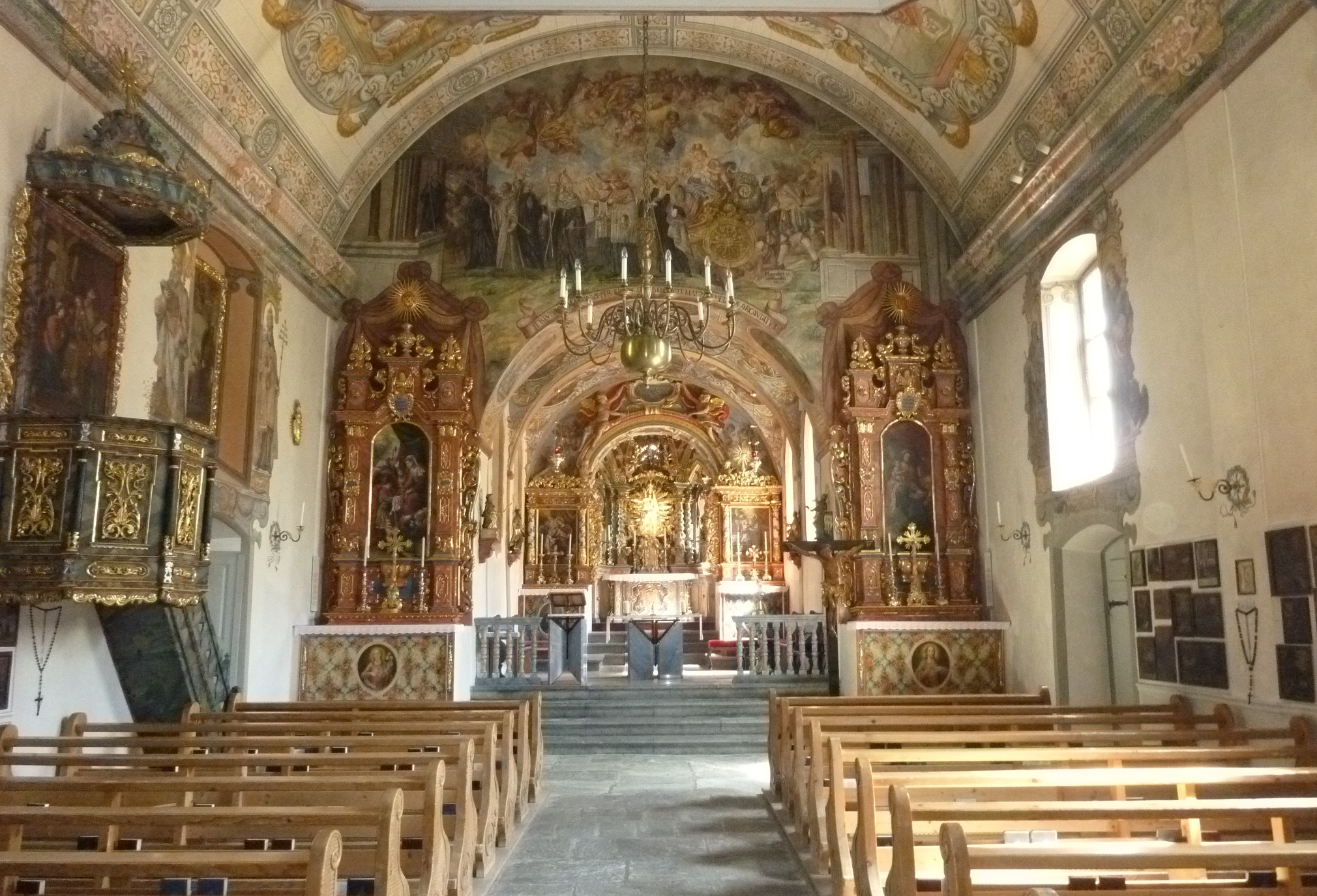 Wallfahrtskirche Maria Licht Innenansicht